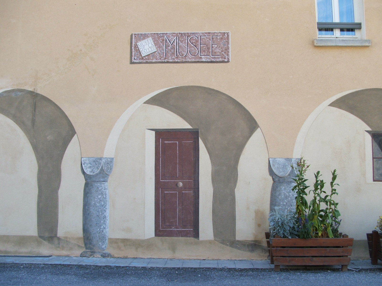 Jausiers, département des Alpes-de-Haute-Provence, France /2